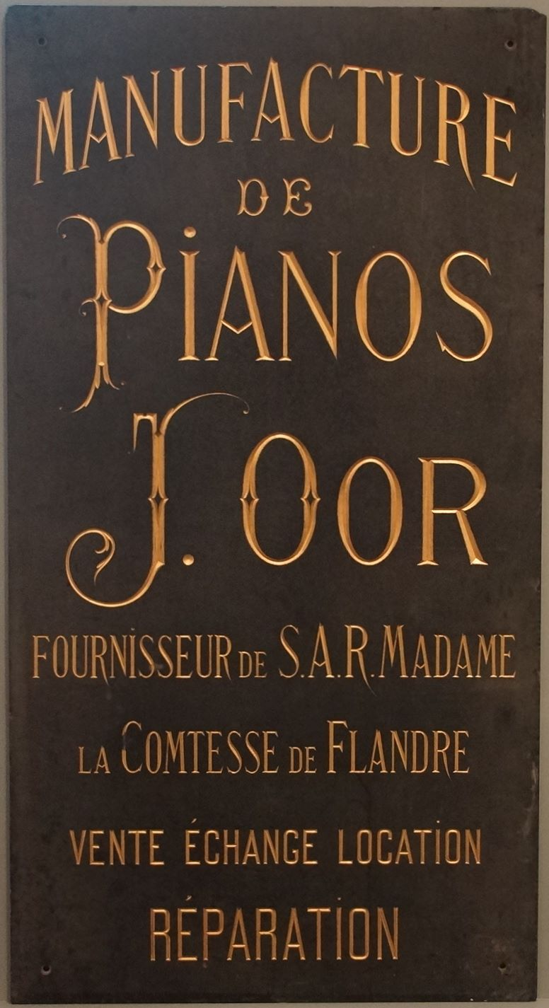 Manufacture de Pianos J. Oor, Fournisseur de S.A.R Madam la Comtesse de Flandre vente echange location reparation. La Fonderie, Musée bruxellois de l’industrie et du travail.